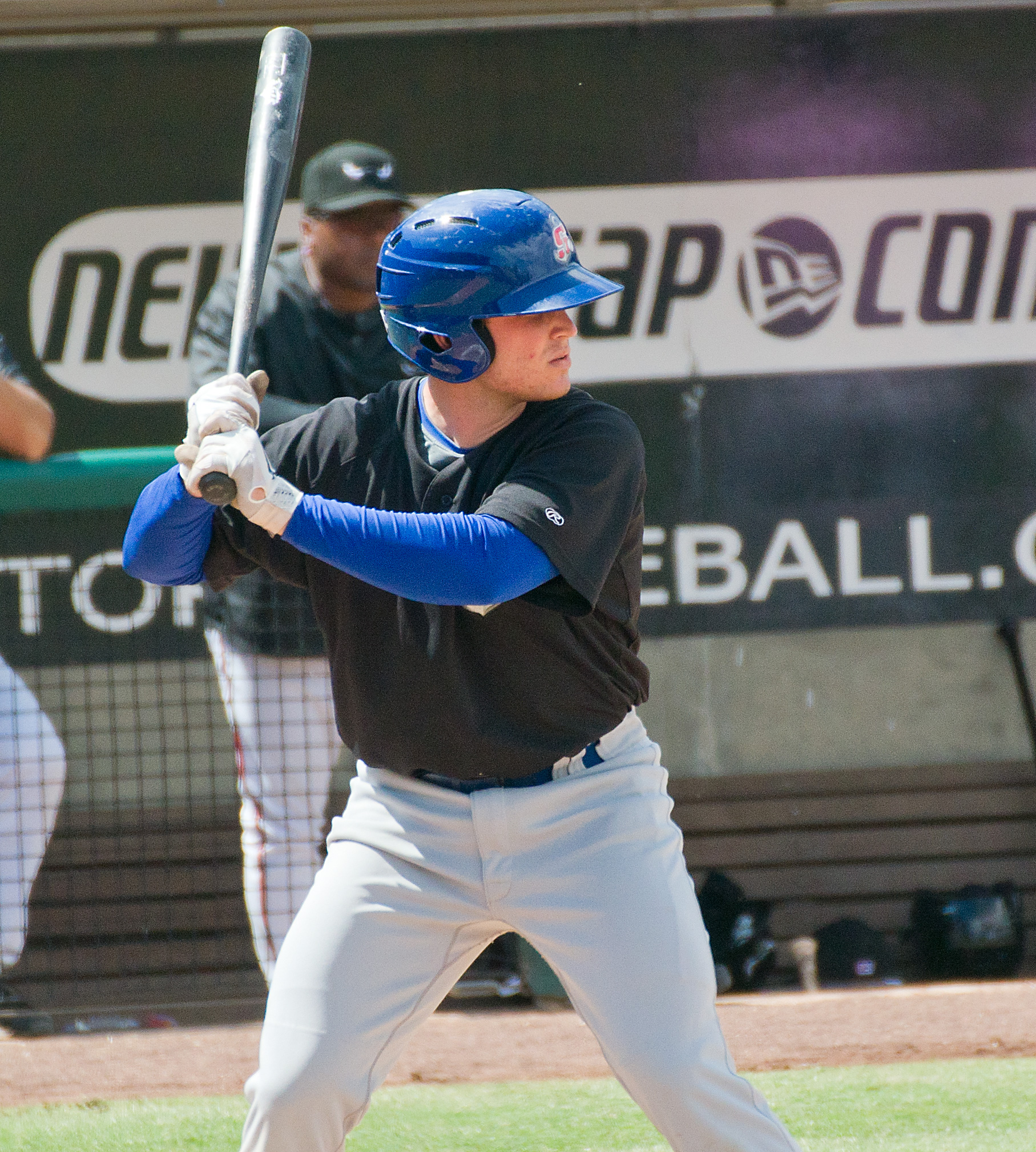 Max Stassi